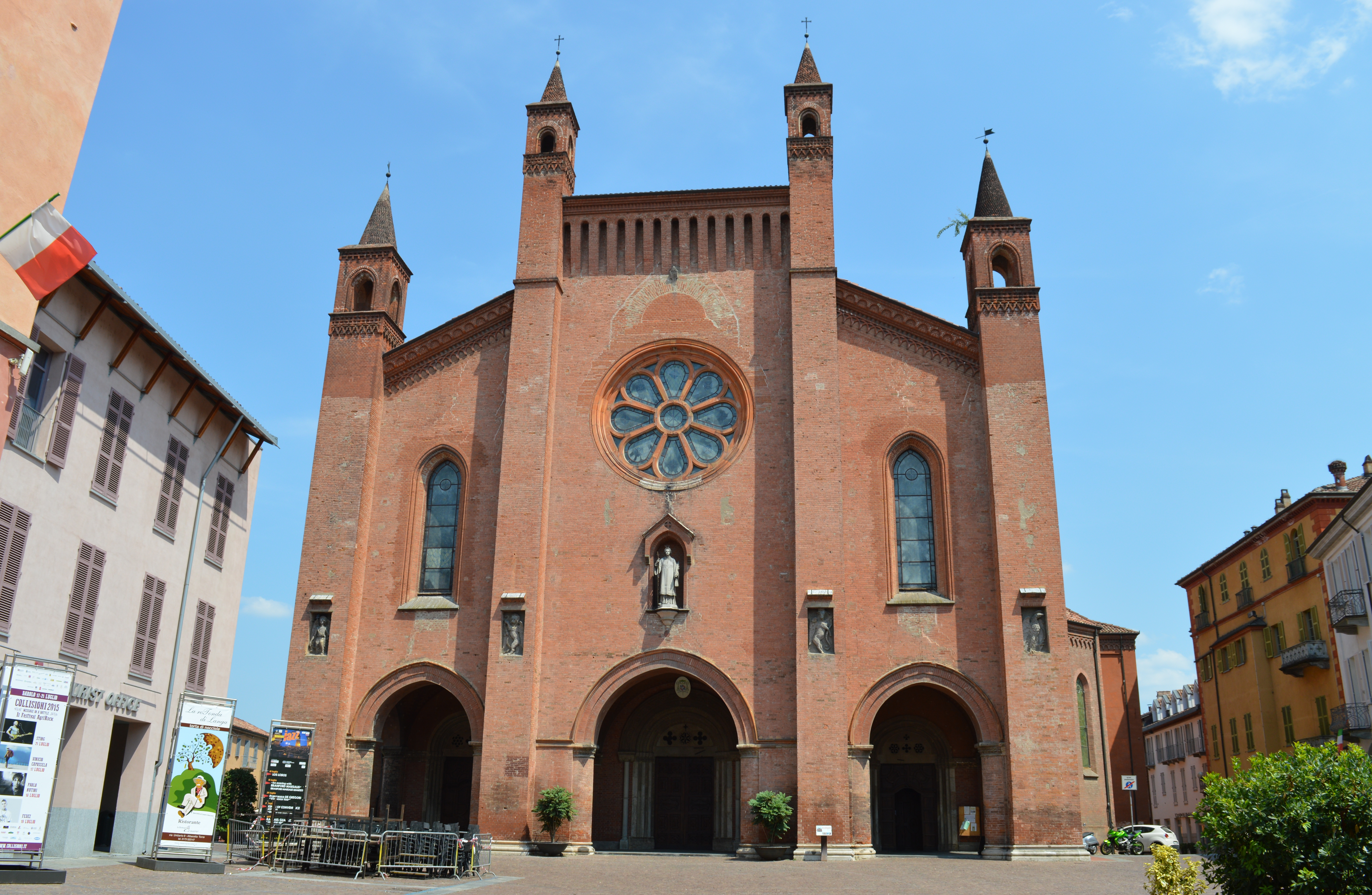 Facciata del duomo di San Lorenzo ad Alba.